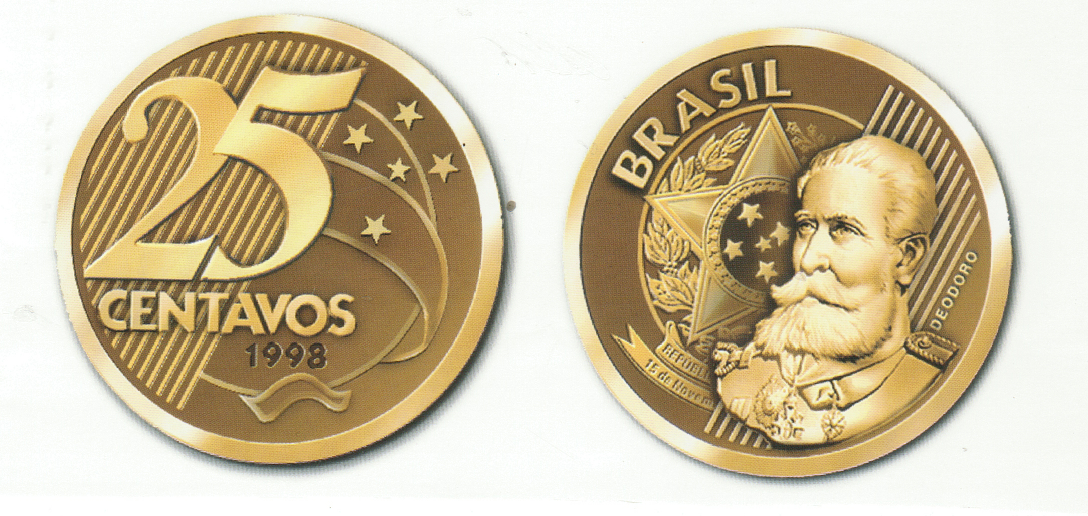 Frente e verso da moeda de 25 centavos da segunda geração do Real com a efígie de Deodoro da Fonseca.